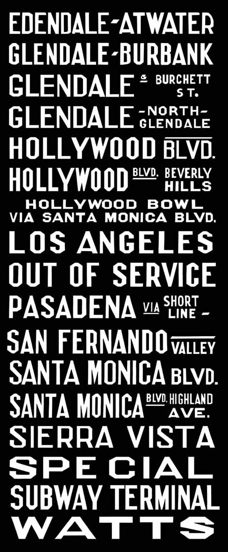 Unrolled Headsign destinations roll - Northwest Division. Zelfgemaakte media in Photoshop CS met gebruikmaking van eigen observaties.